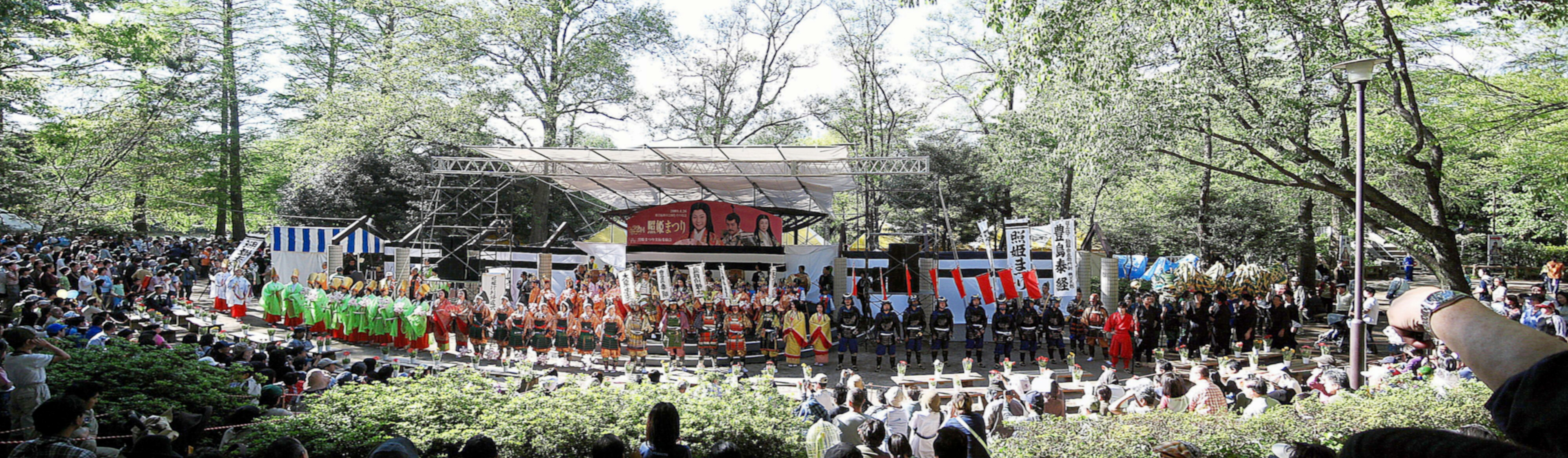 "Teruhime festival" at Shakujii park. Nerima, Tokyo.